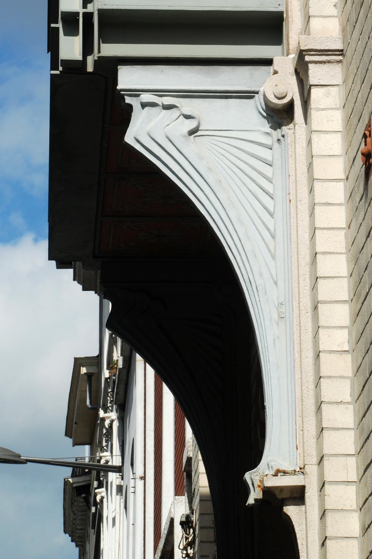 Belgique - Bruxelles - Maison Govaerts